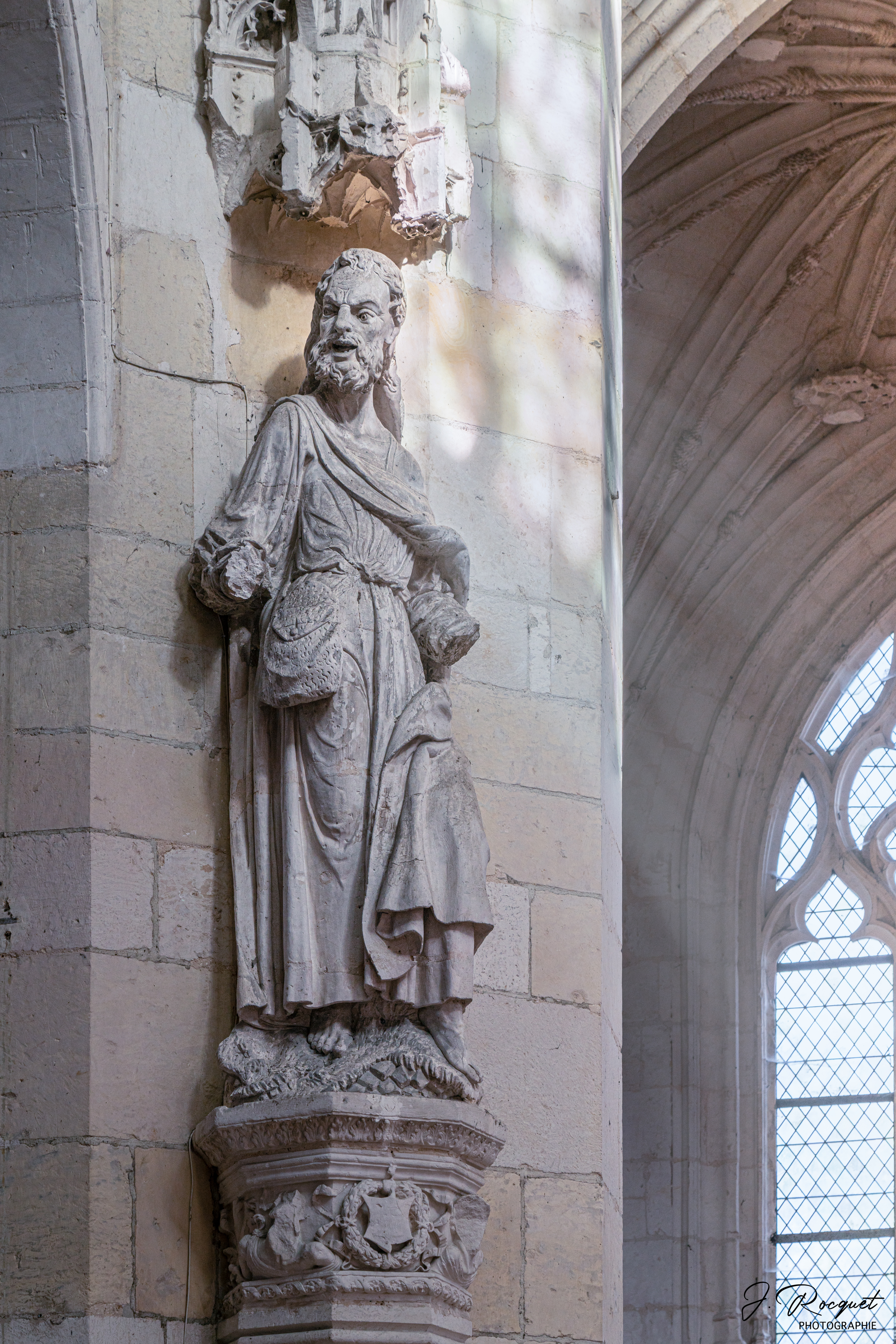 Statue de Saint Jacques Le Majeur contre le pilier gauche à l'entrée de l'église abbatiale de Saint Riquier. Cette statue aurait fasciné Victor Hugo.